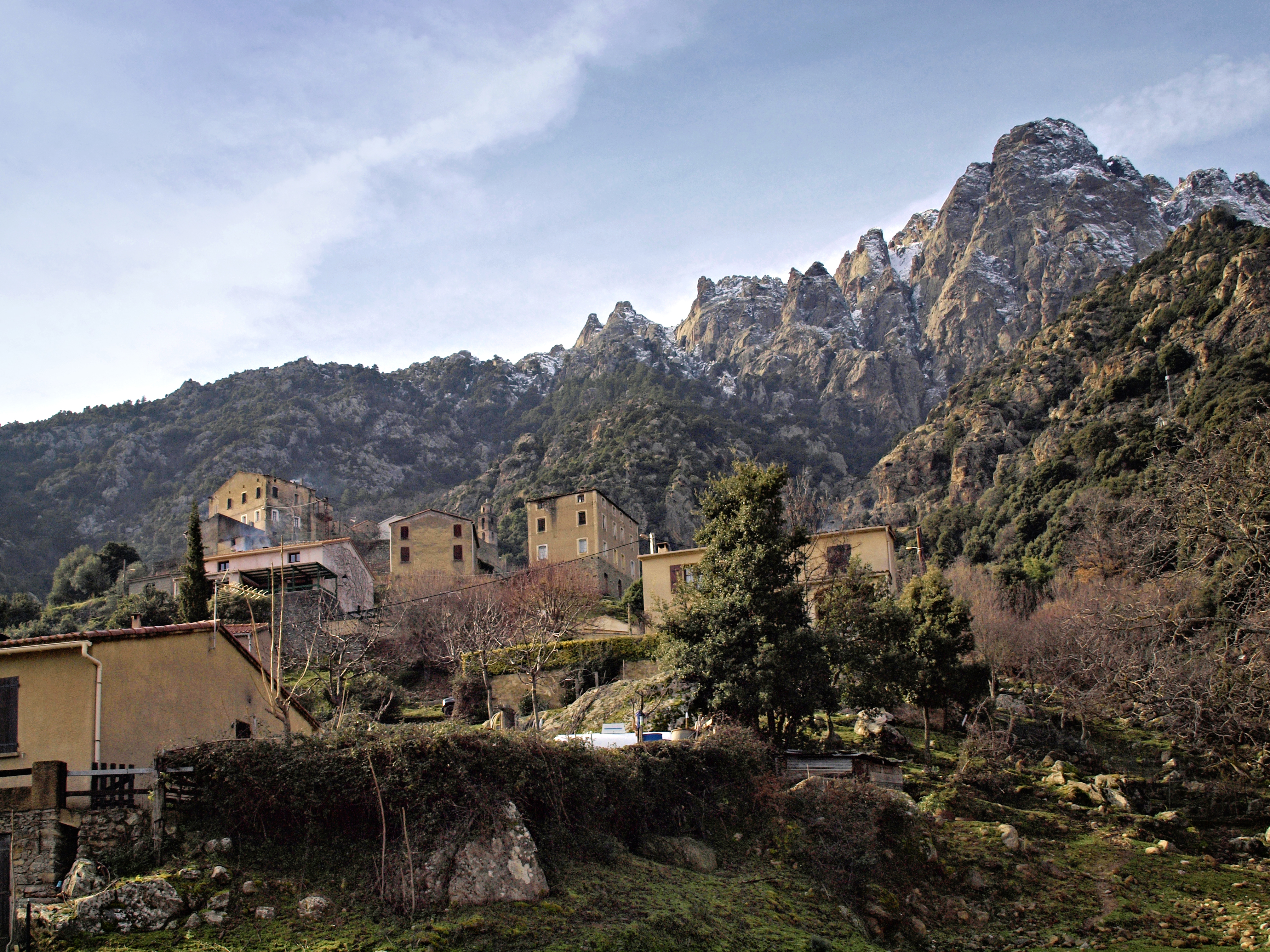 Popolasca (Corsica) - Le village et les Aiguilles de Popolasca.